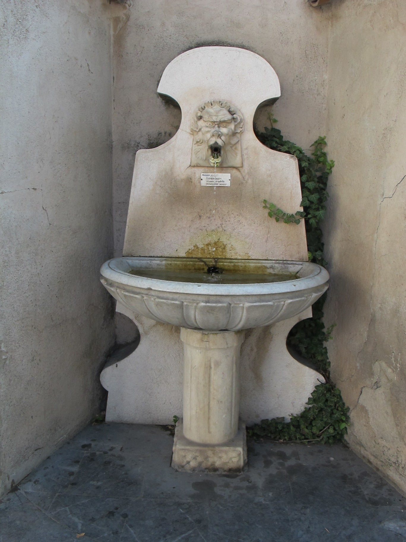 Bressanone, fontanella via bastioni minori